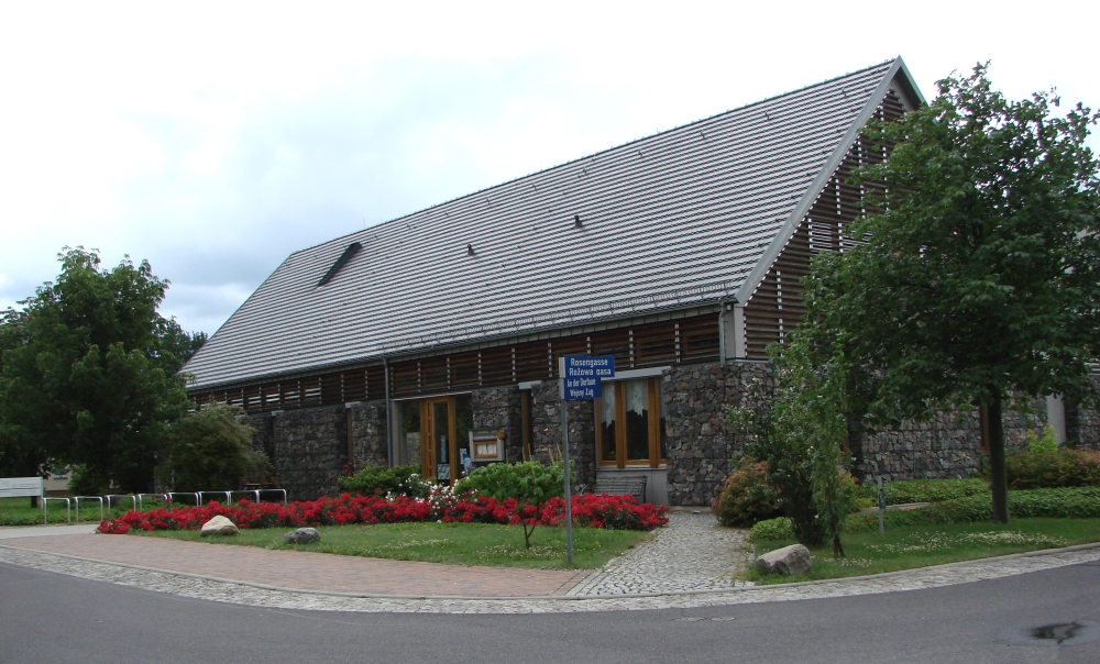 Gebäude des Archivs und des Gemeindezentrums in Horno.